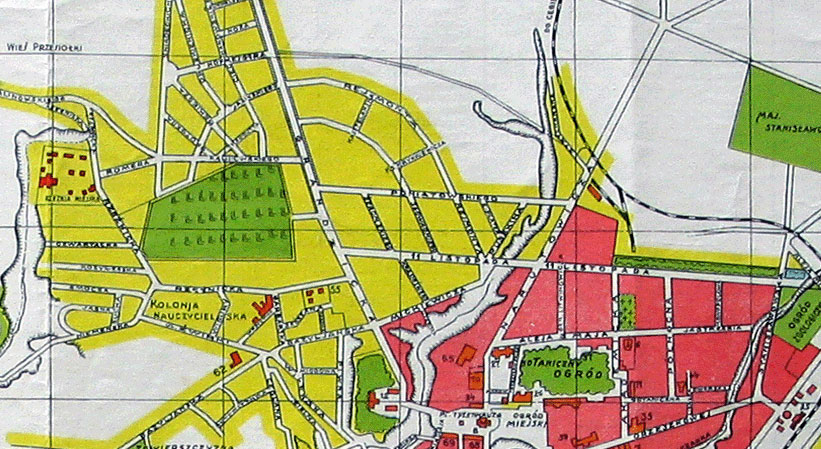 Беларуская (тарашкевіца): Мапа Новага сьвету, Горадня